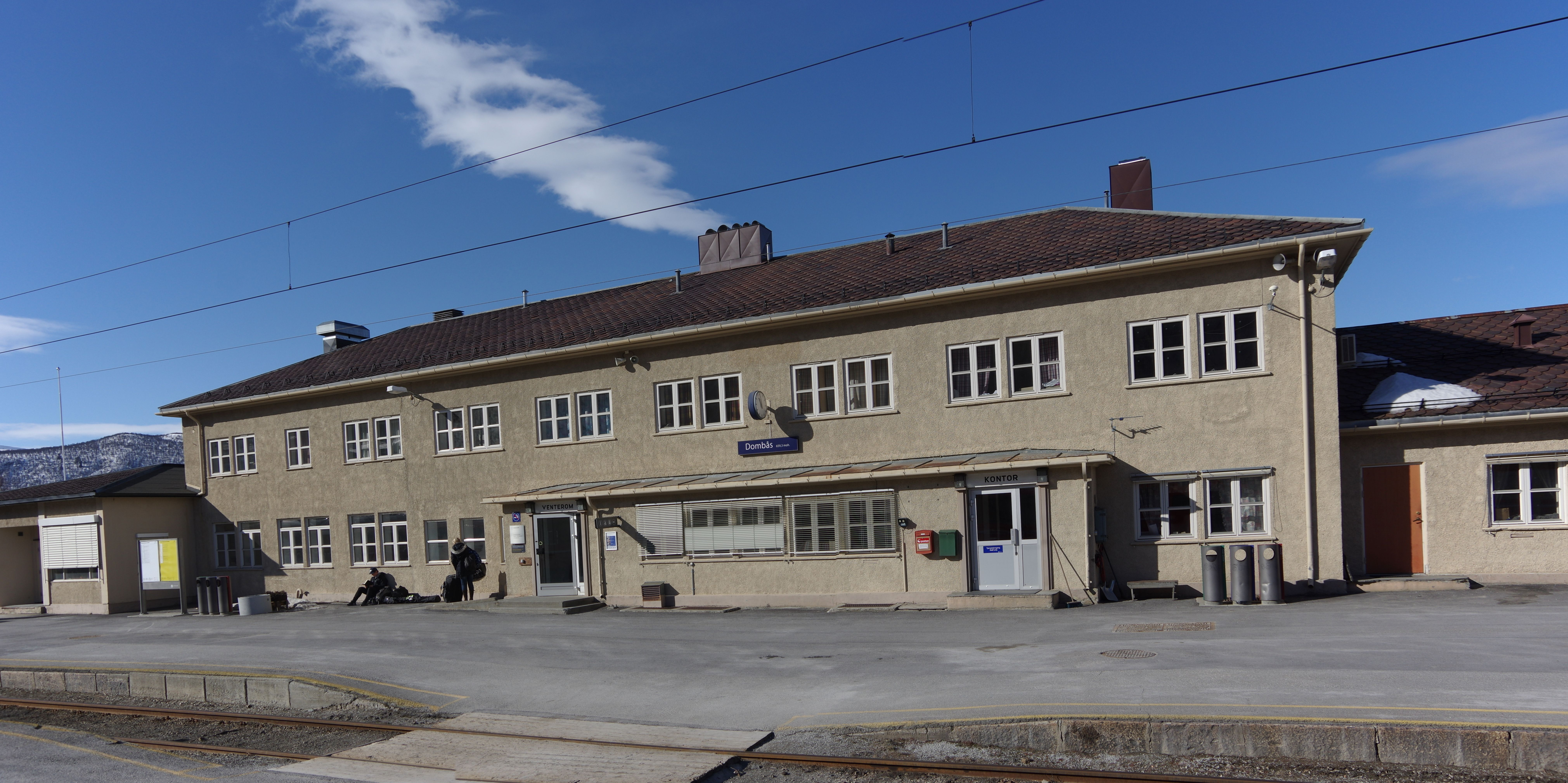 Dombas in Norwegen. Der Bahndhof des Ortes liegt an der Dovrebahn.